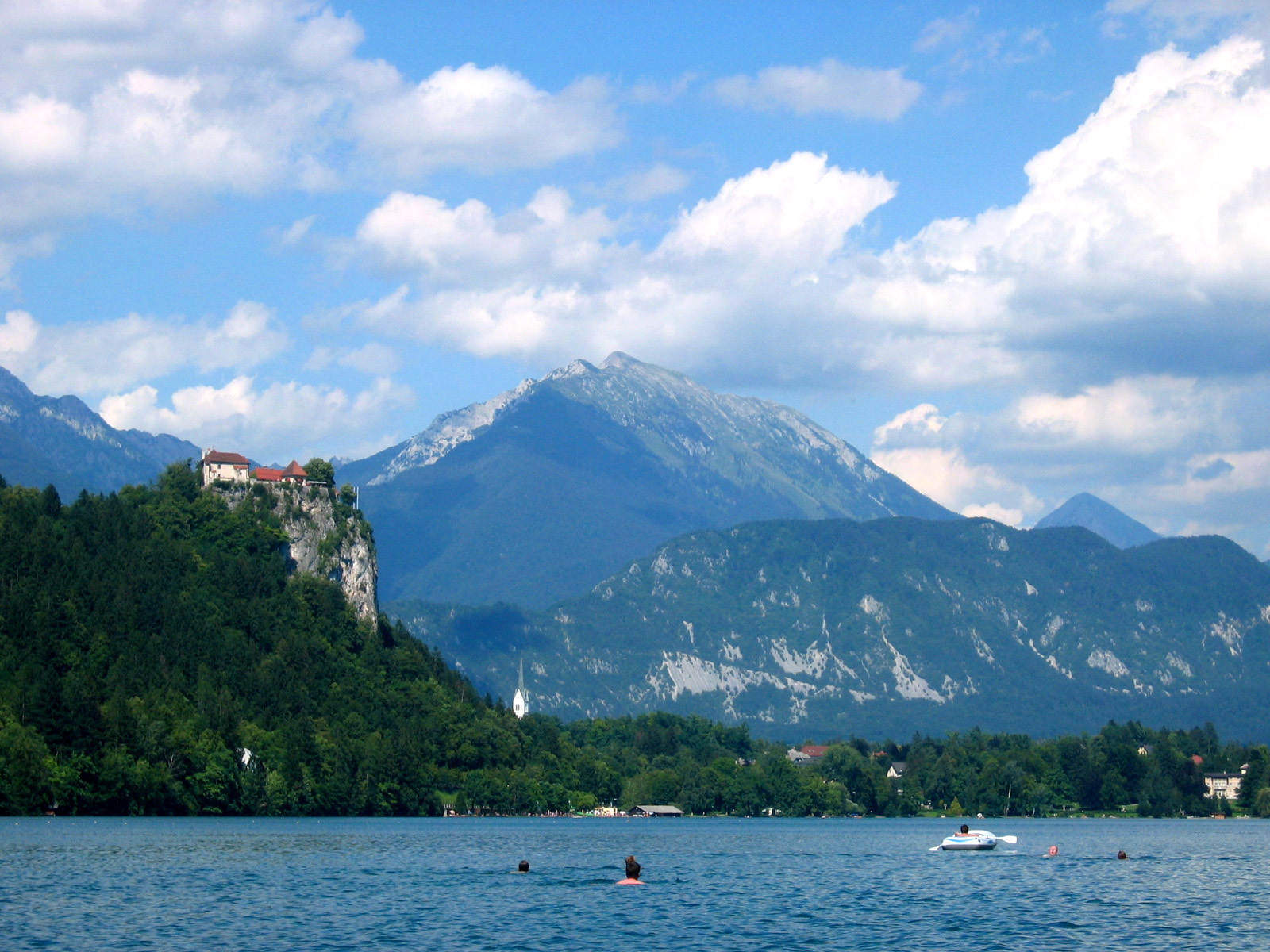 Begunjščica, mountain in Slovenia (Karavanke alpine group)